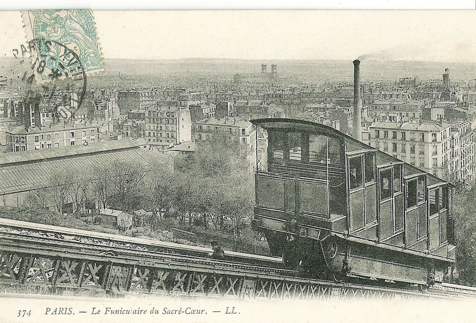 Carte postale ancienne éditée par LL N° 374PARIS - Le funiculaire du Sacré-Cœur